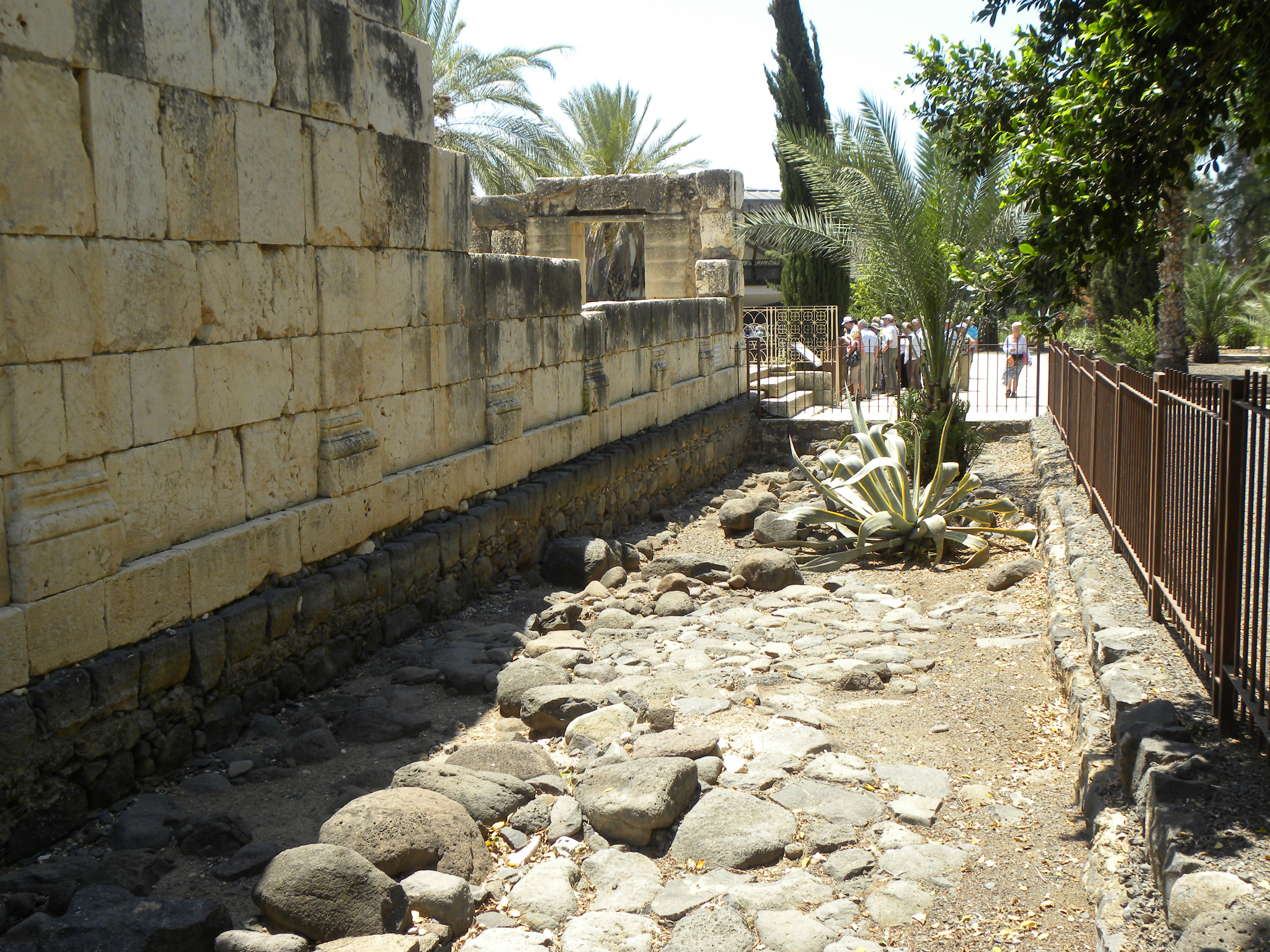 Last Import-199 Capernaum